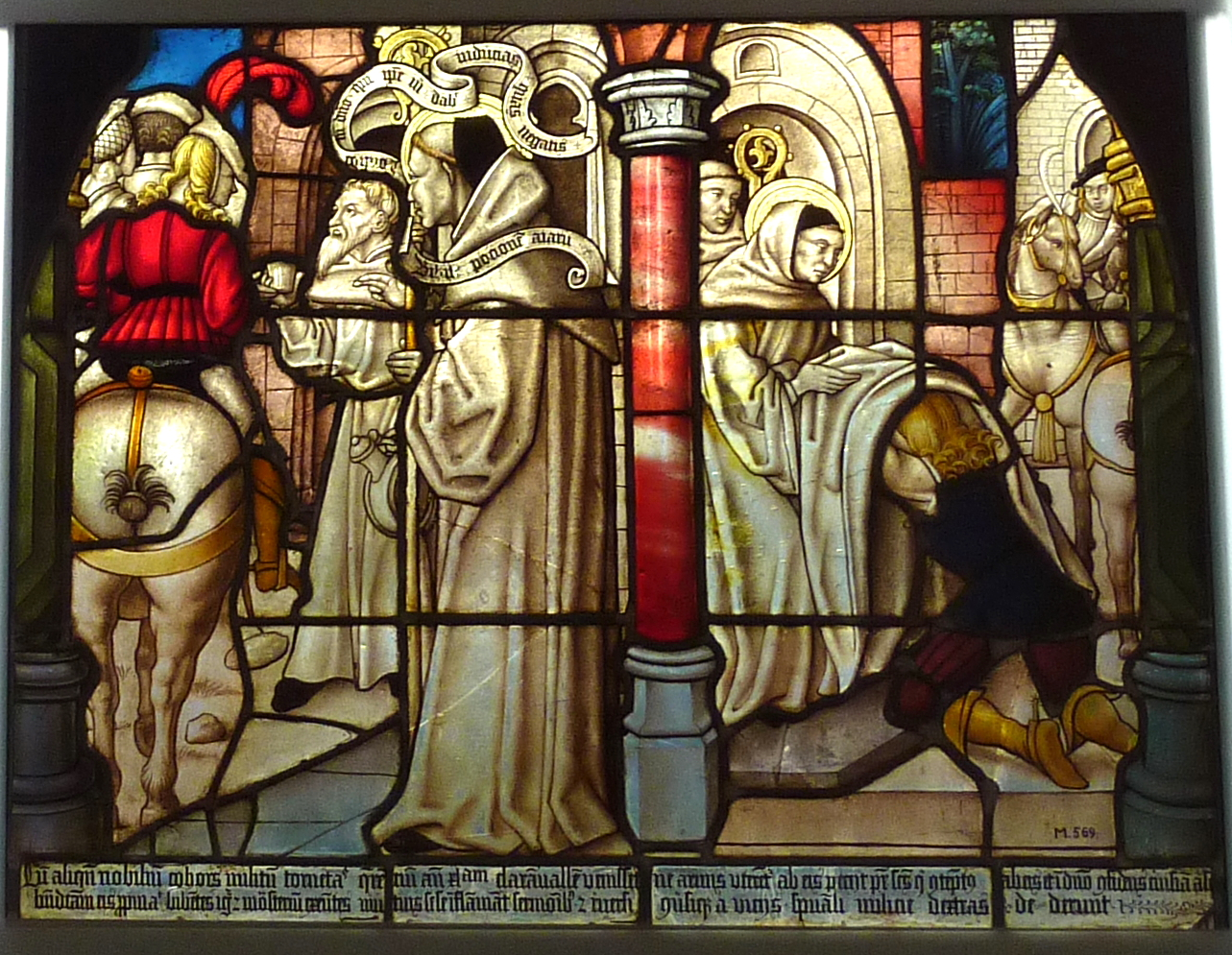 Bleiglasfenster im Museum Schnütgen in Köln (siehe Dagmar Täube: Rheinische Glasmalerei. Meisterwerke der Renaissance, Bd. II Katalog, Schnell und Steiner, Regensburg 2007, ISBN 978-3-7954-1944-8)